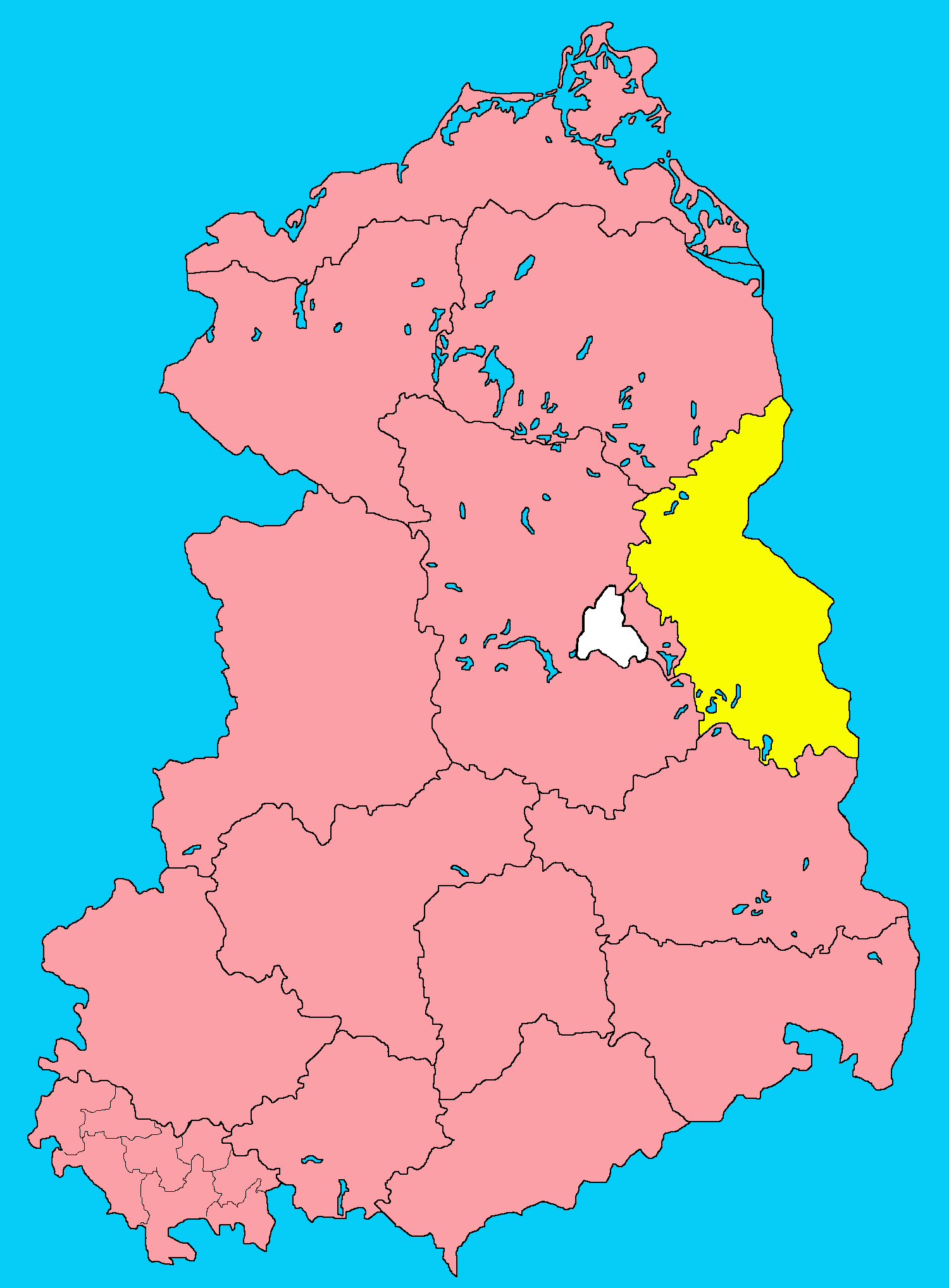 Karte Bezirk Frankfurt/Oder der DDR